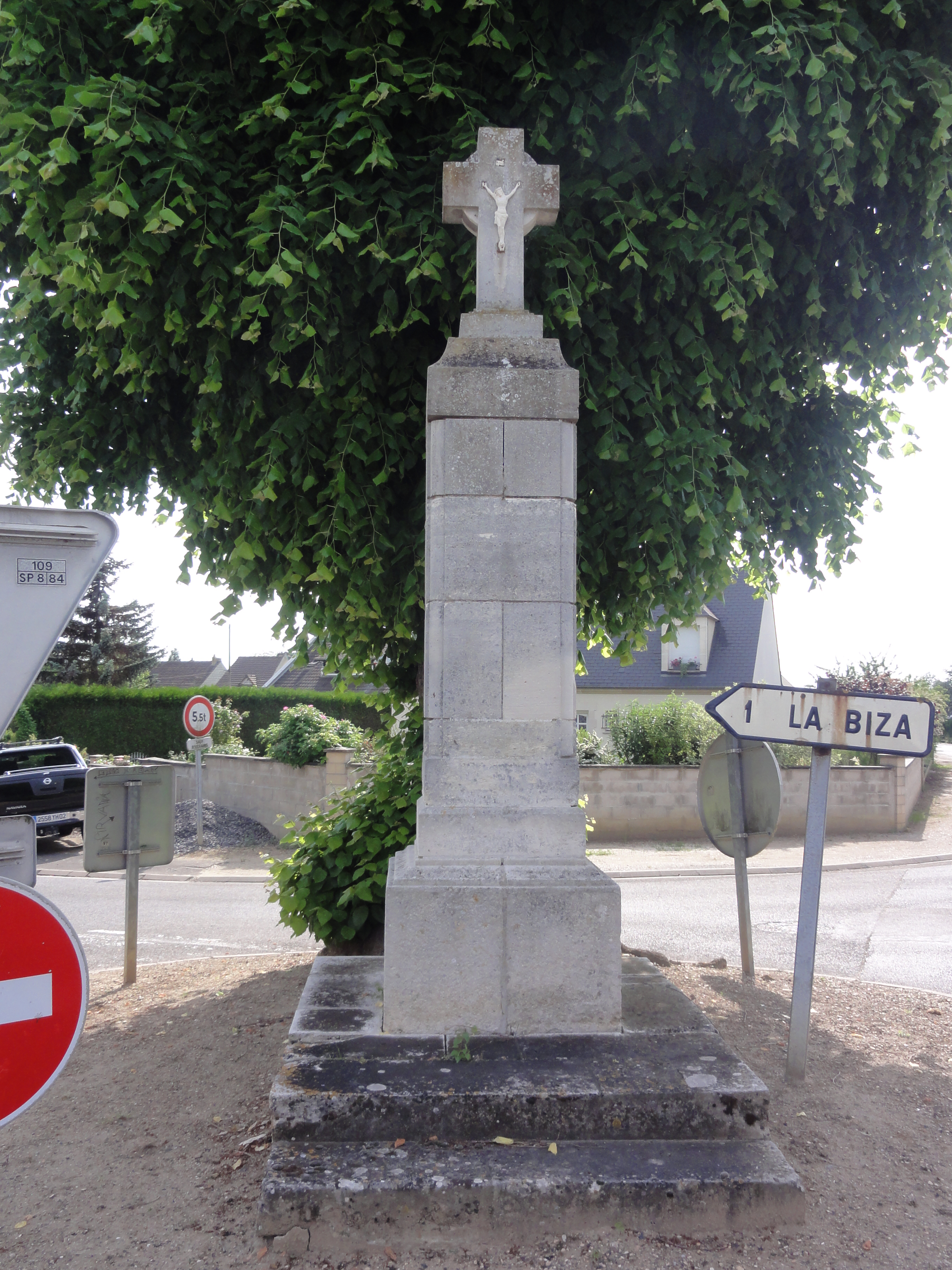 Missy-sur-Aisne Croix de chemin